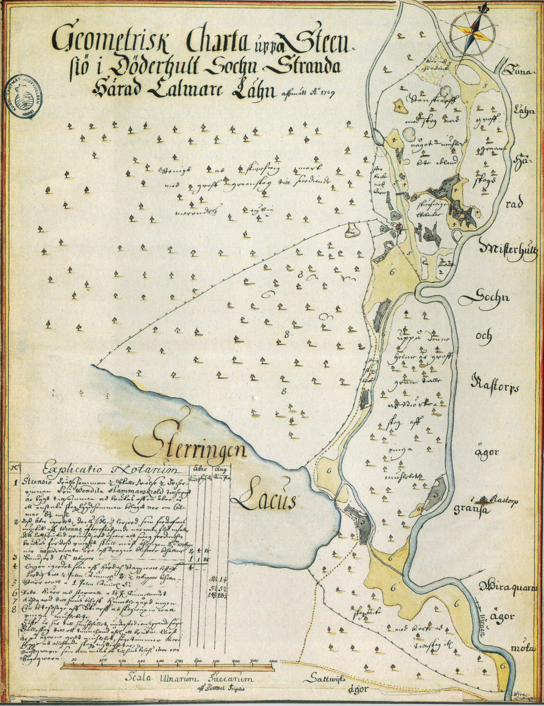 Karta över Stensjö by i Döderhult Socken